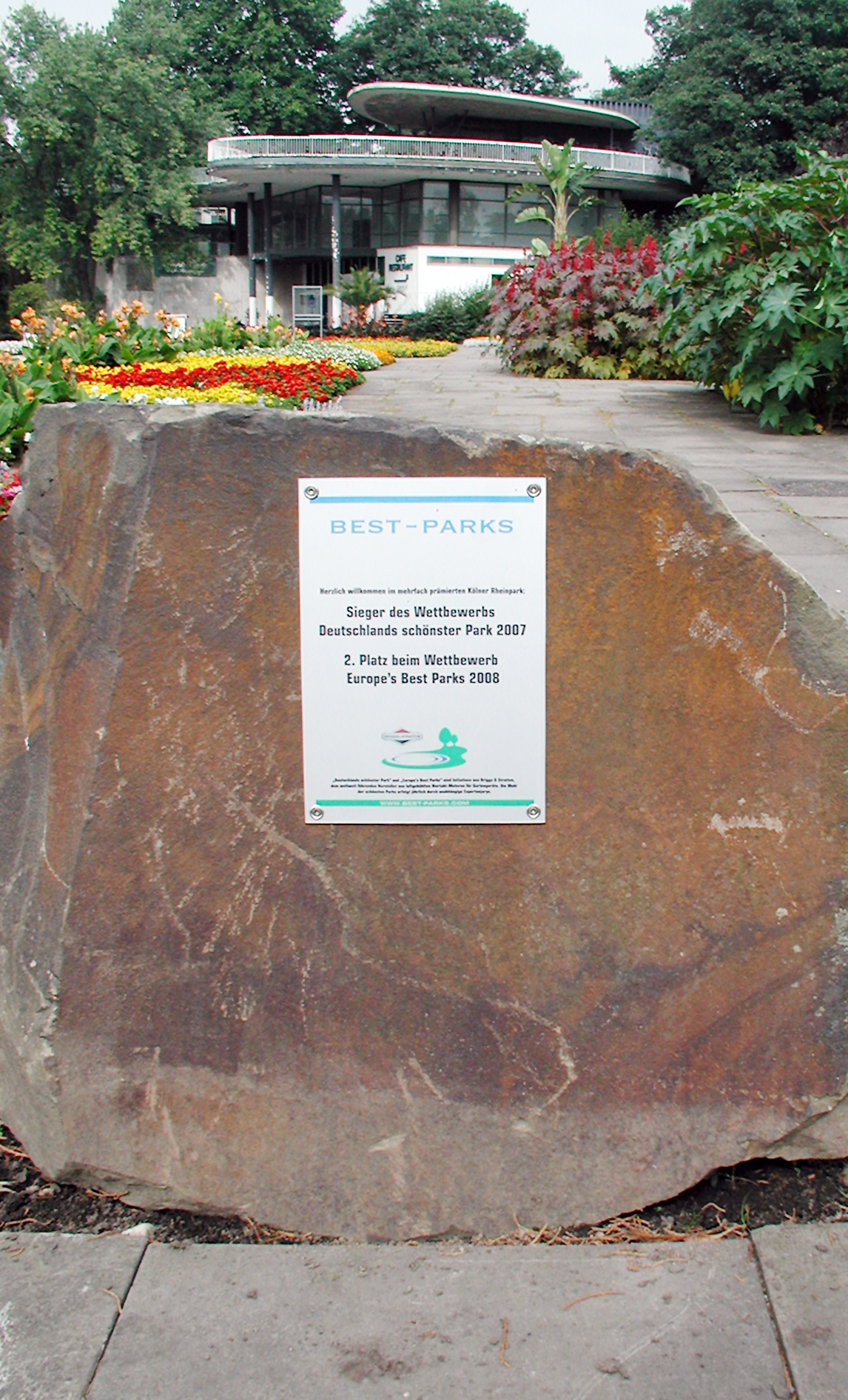 Rheinpark Köln, Auszeichnung.